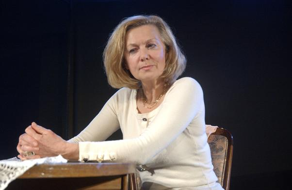 Halina Rowicka, spektakl "Piranie w Akwarium" (wg Ryszarda Marka Grońskiego), teatr tm.